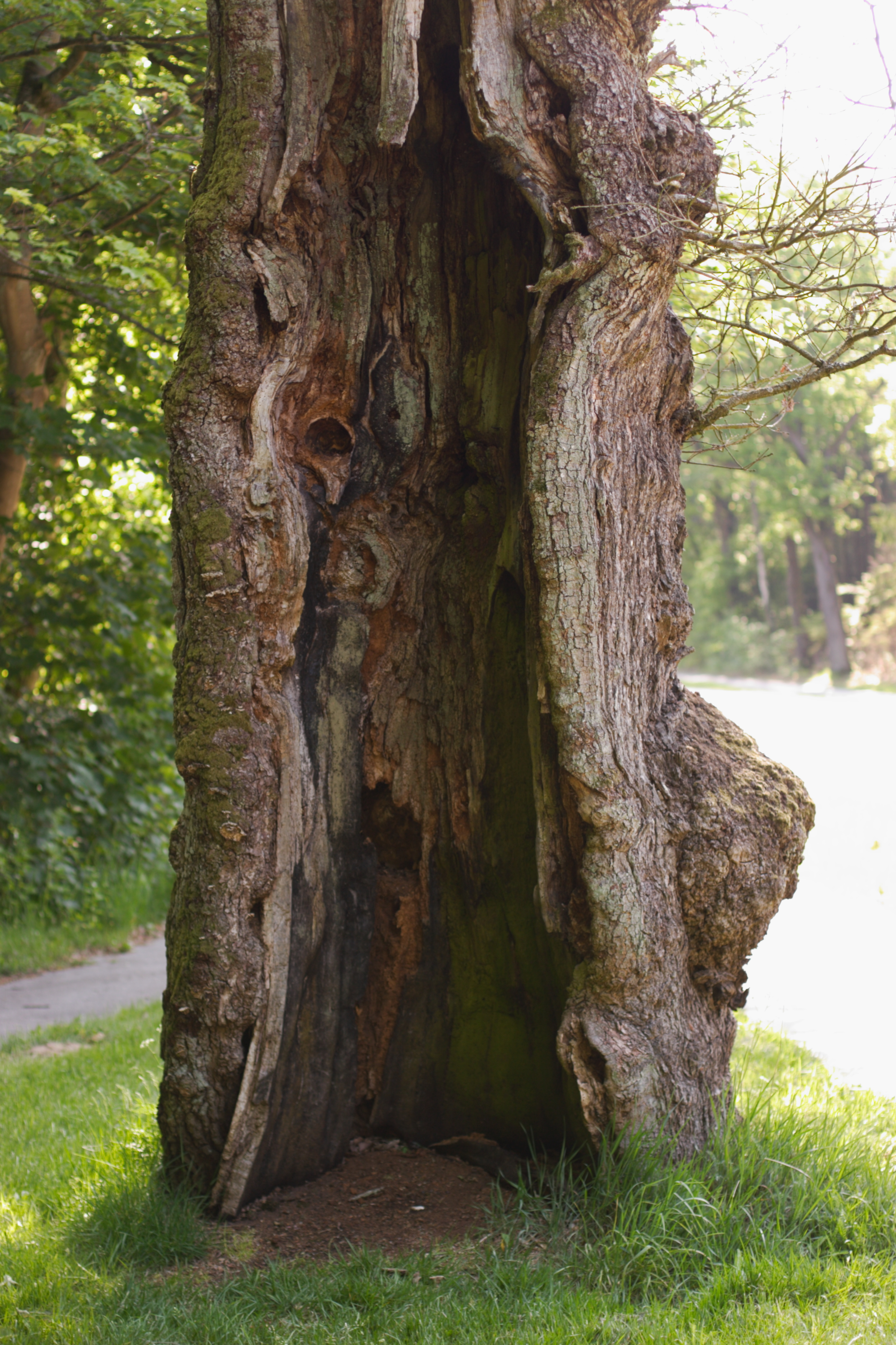 Den hule eg ved Århusbakken i Silkeborg